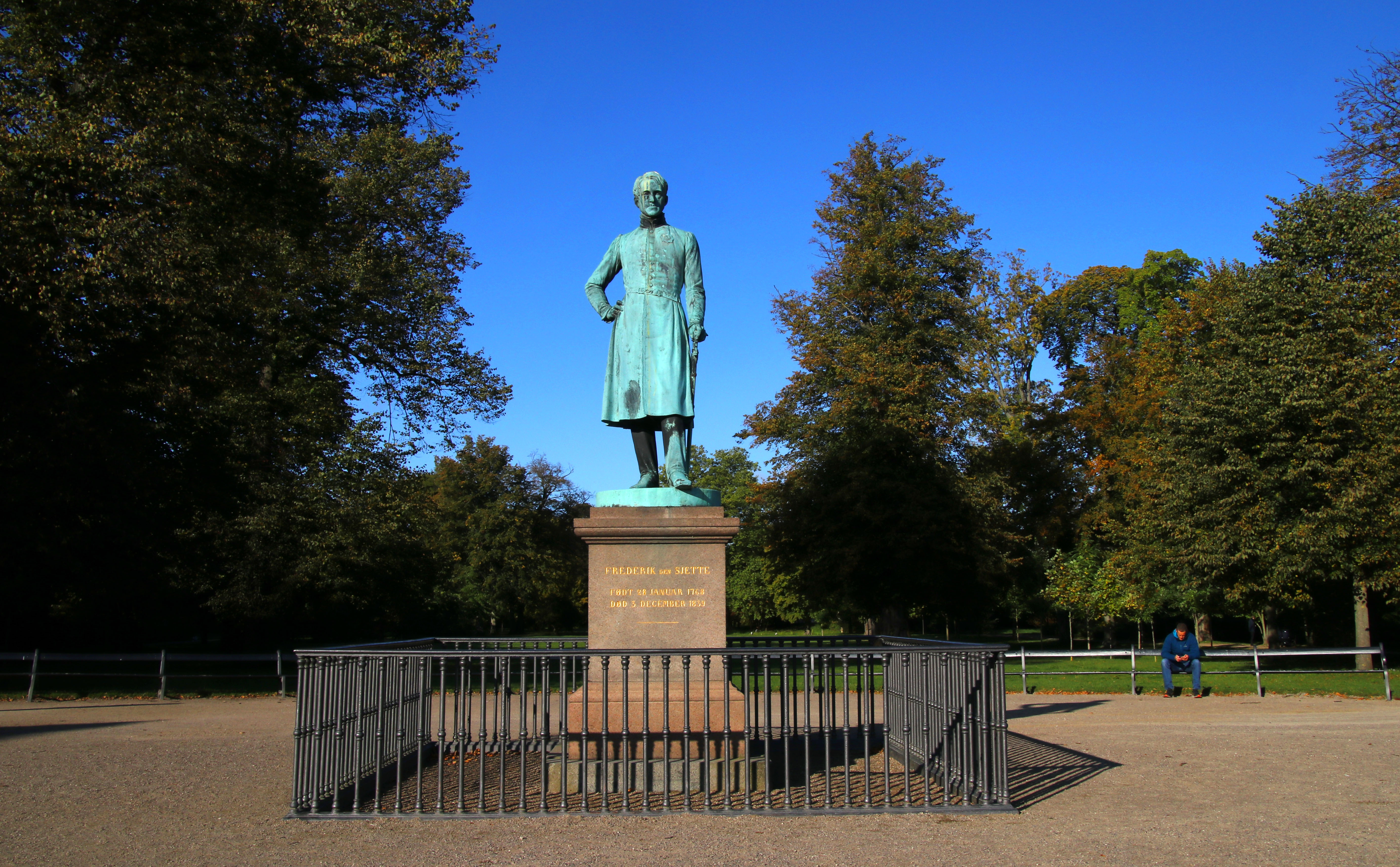 Statue of Frederick VI in Frederiksberg Gardens in Copenhagen, Denmark